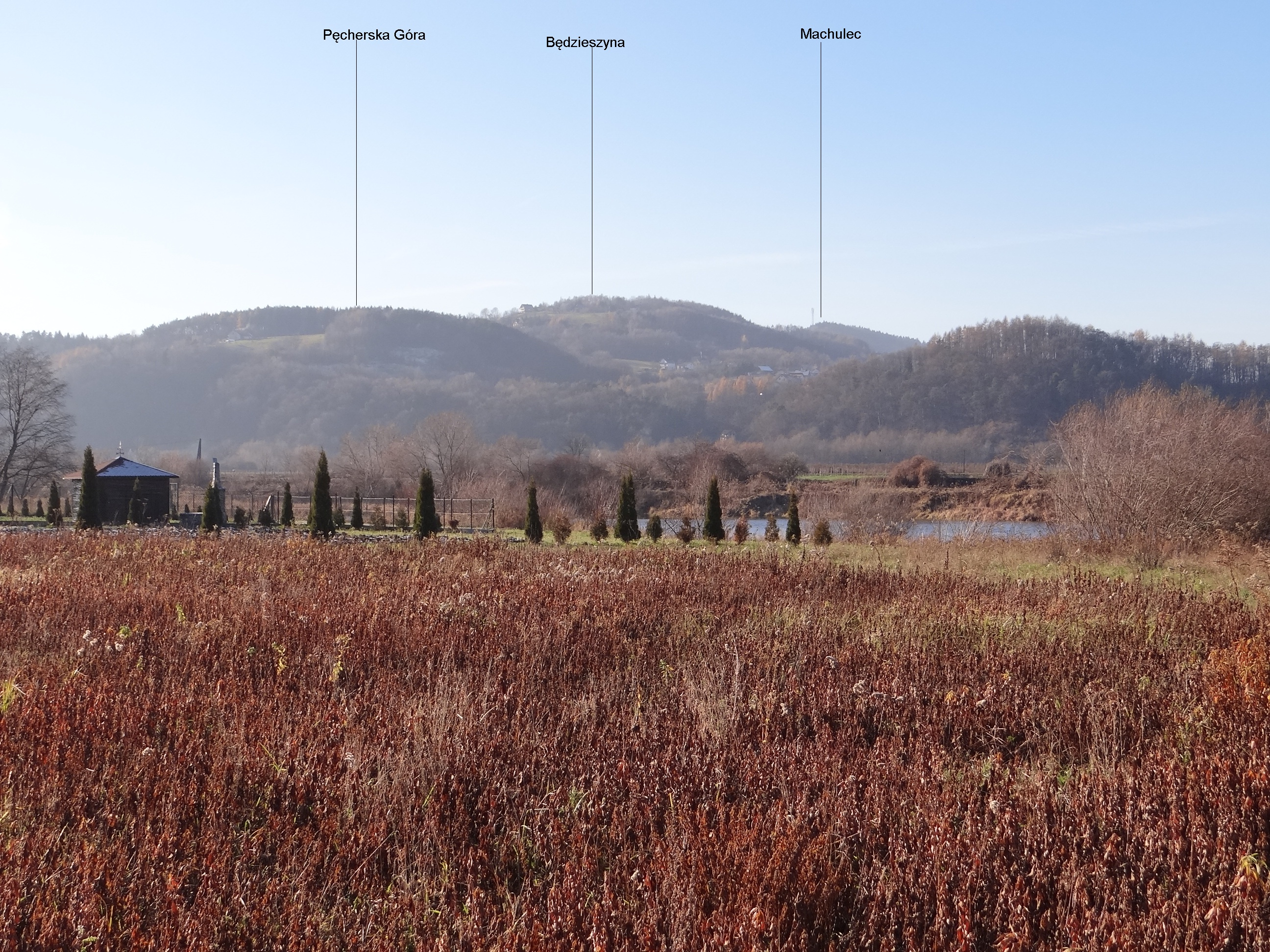 Widok z miejscowości Piasków- Druźków (przy promie)